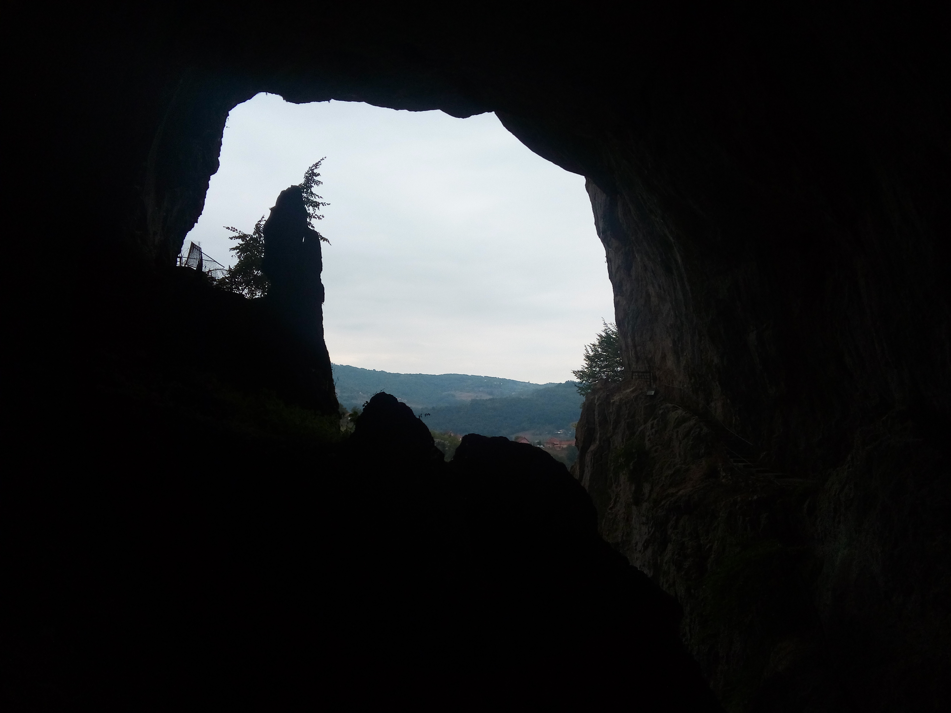 Ово је фотографија заштићеног природног добра у Србији под шифром: СП223This is a a photo of a natural area in Serbia with ID: СП223 Potpećka pećina se nalazi u selu Potpeć, 14 km od Užica, u severnom podnožju Drežničke gradine (932 m.n.v.). Ulaz u Potpećku pećinu spada u red monumentalnih dela prirode.